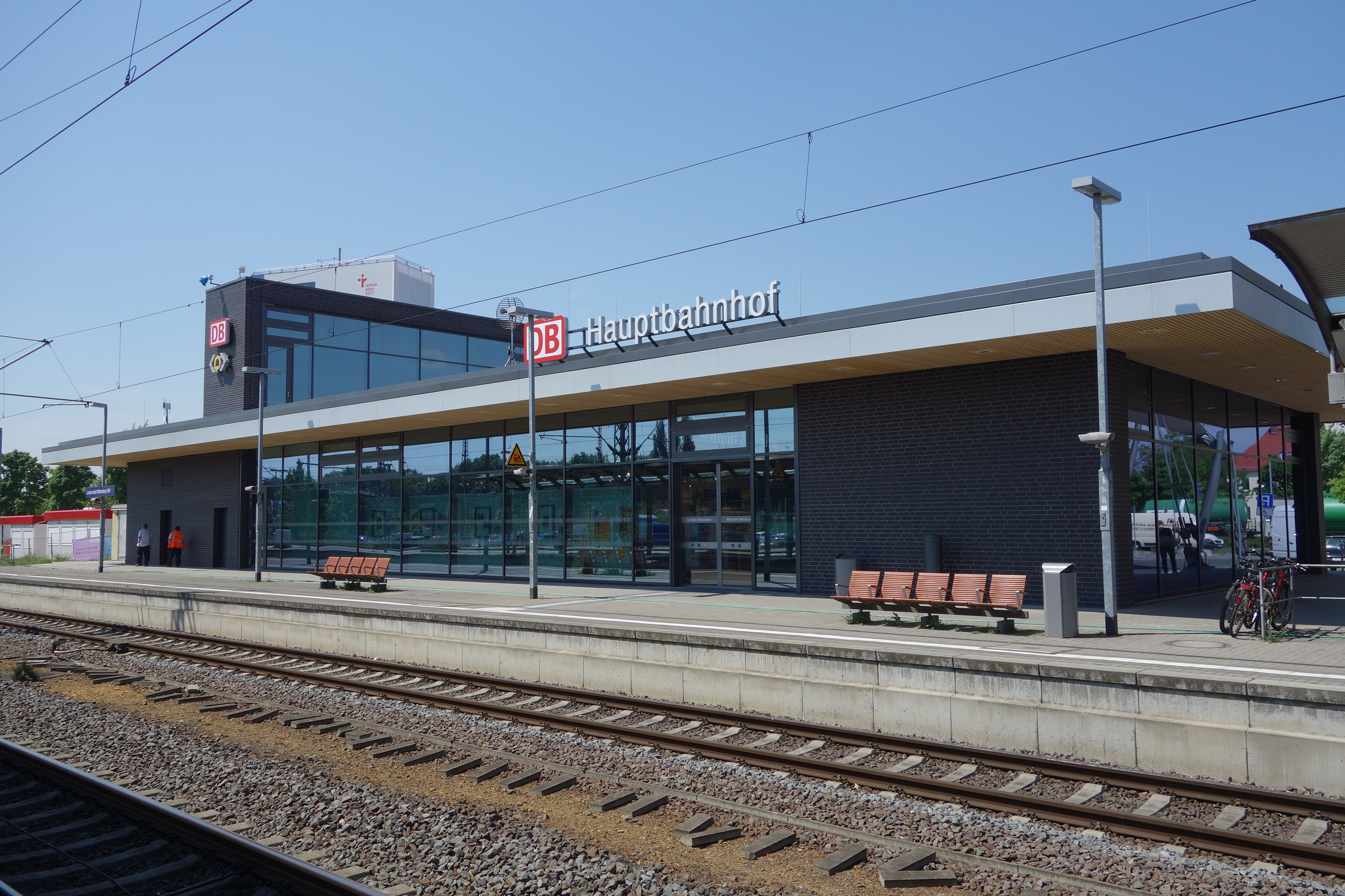 Lutherstadt Wittenberg Hauptbahnhof, Empfangsgebäude Gleisseite